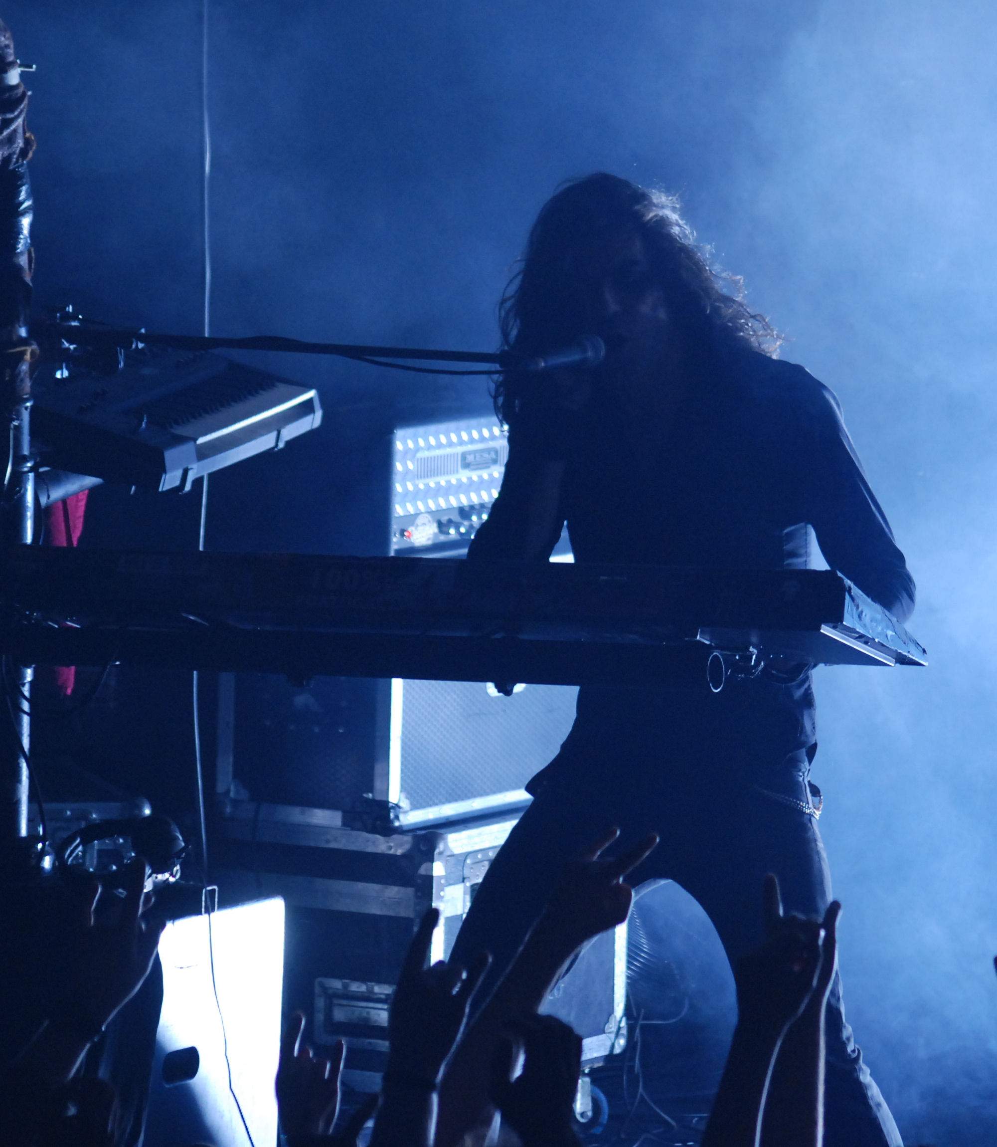 Koncert Moonspell'a (Pedro Paixao) w klubie Studio w Krakowie